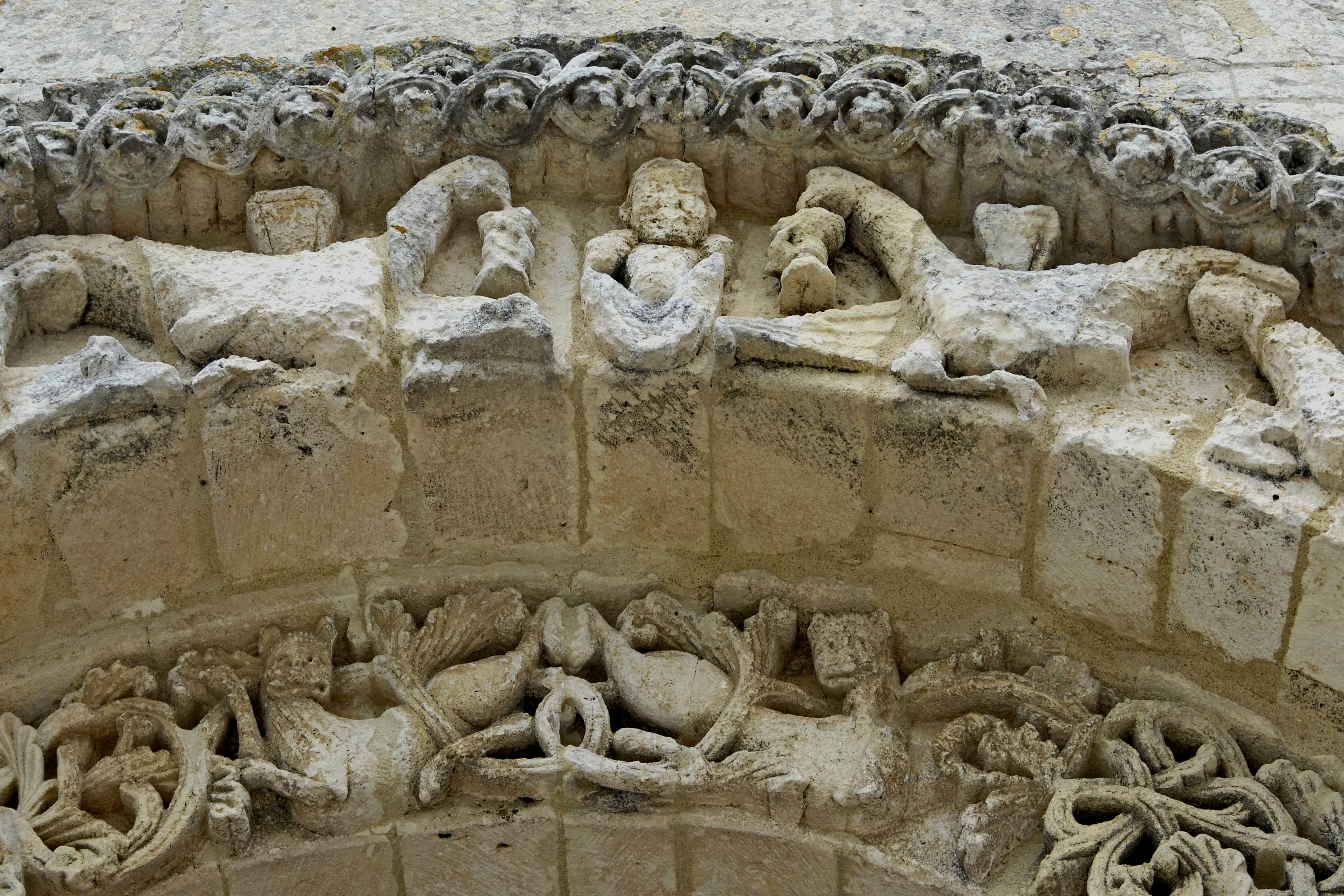 Notre-Dame Corme-Écluse,Hauptportal, Scheitel